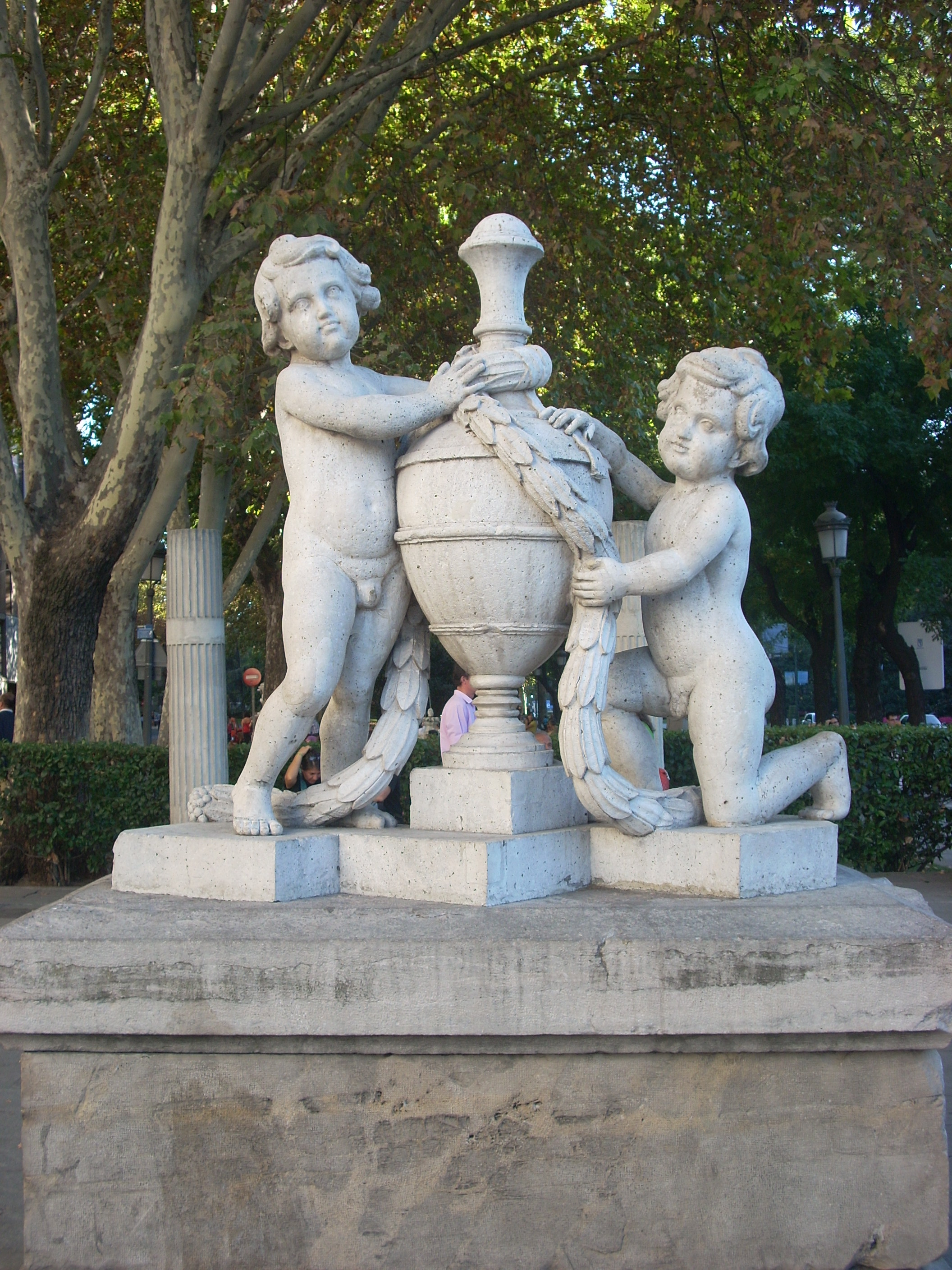 Estatua ornamental representando a dos niños con un jarrón, en las cercanías de la Fuente de Cibeles, Paseo del Prado, Madrid, España.